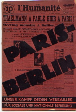 Ernst Thälmann und Maurice Thorez: Paris - Berlin. Unser Kampf gegen den imperialistischen Krieg, gegen Versailles. Für die soziale und nationale Befreiung